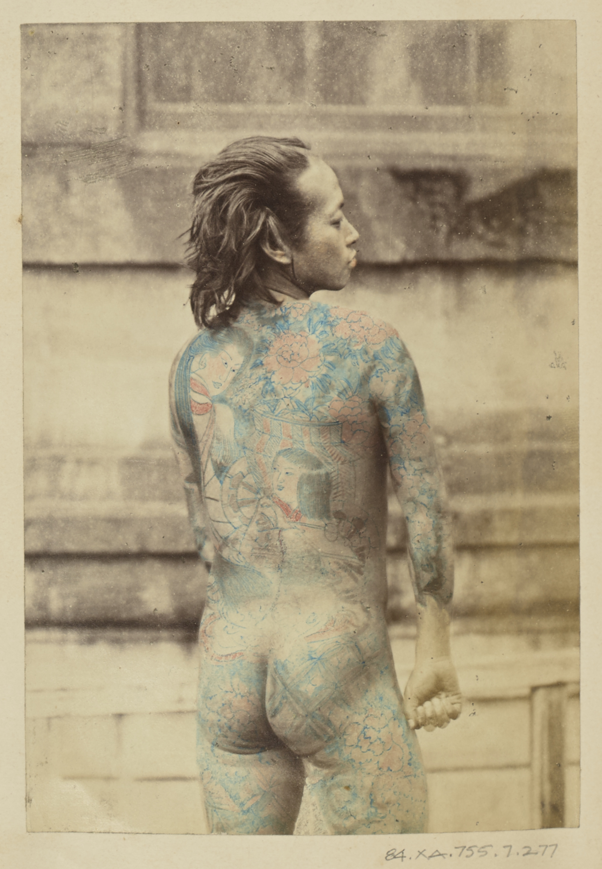 Vista posterior de un hombre japonés tatuado; Felice Beato (Inglés, nacido en Italia, 1832 - 1909), o Baron Raimund von Stillfried (Austriaco, 1839 - 1911); 1868 - 1880; Papel a la albúmina impregnado en solución de nitrato de plata y coloreado a mano; 14 × 9.5 cm; 84.XA.755.7.277; Sin derechos de autor en Estados Unidos (